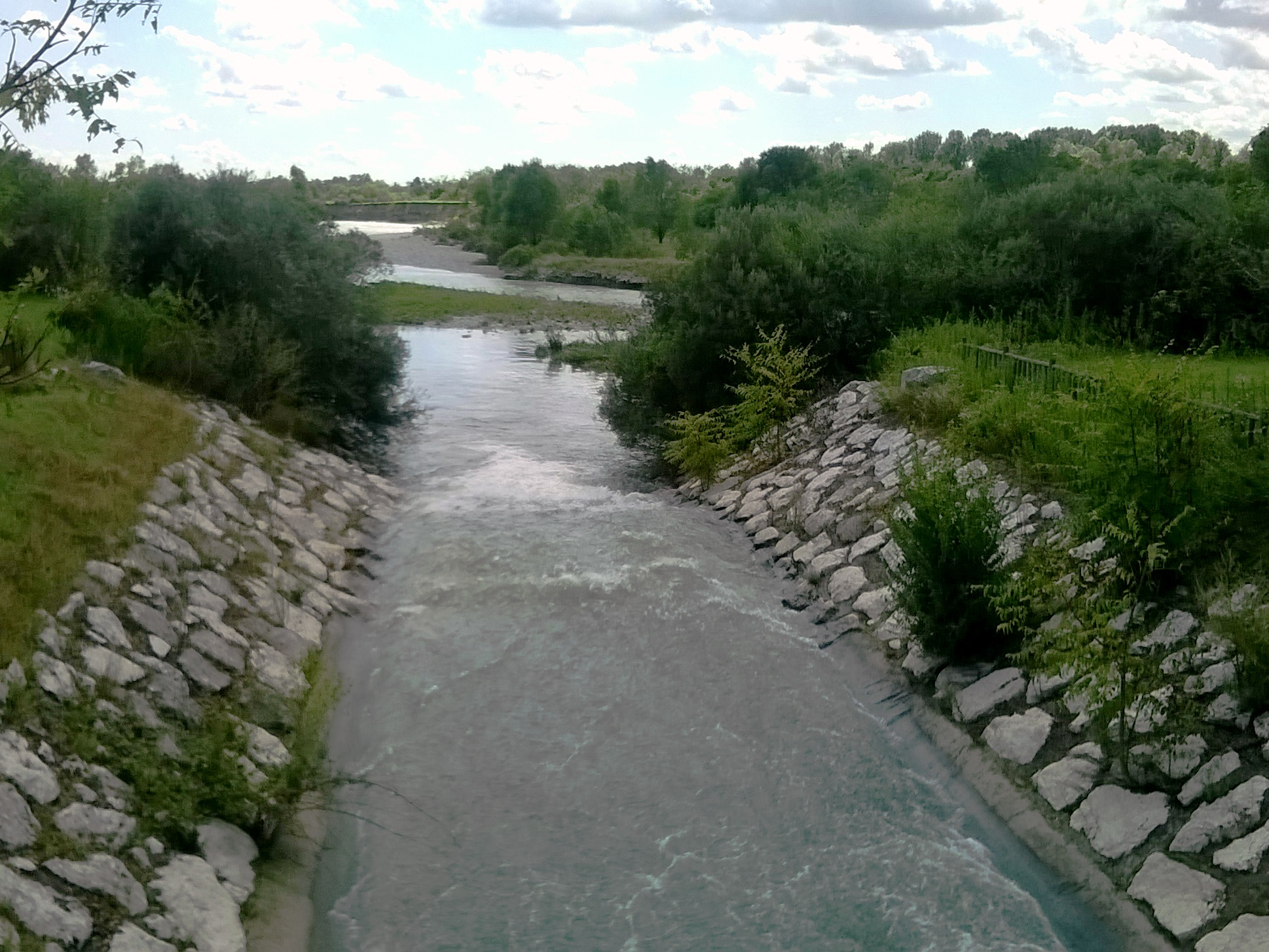 Immissione della roggia Borgogna nel Serio, Calcinate (BG)